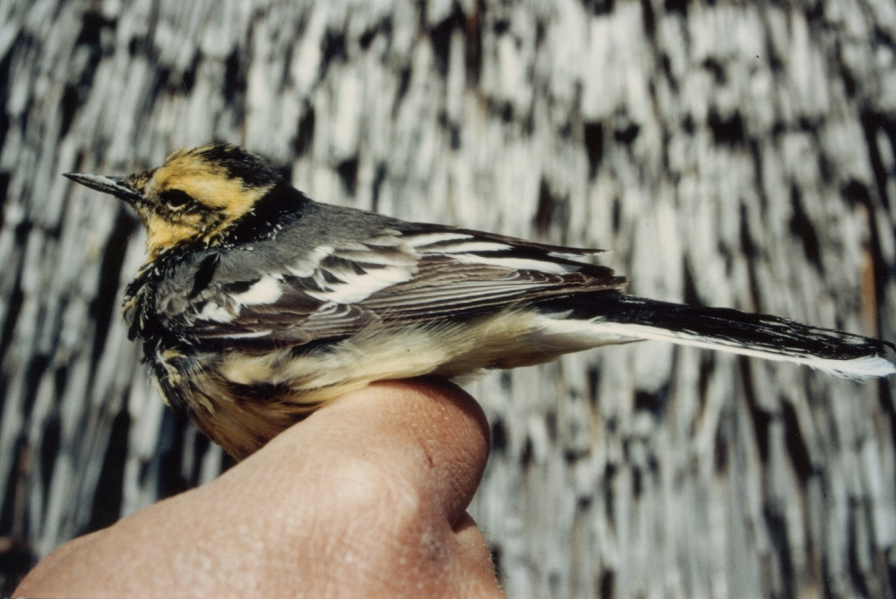 Mekszikópusztán gyűrűzött öreg hím citrombillegető